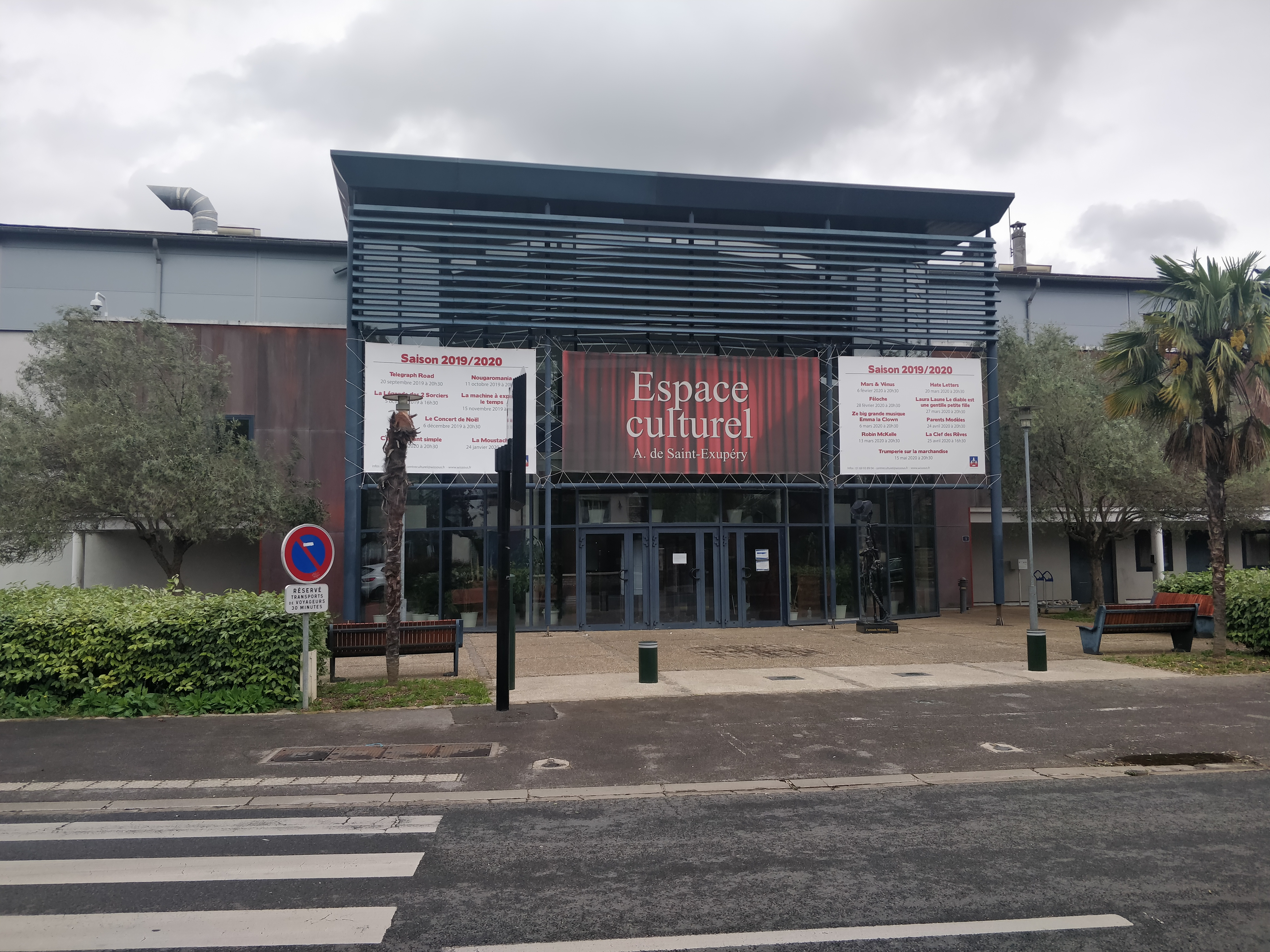 Espace culturel Saint Exupéry de Wissous, France.